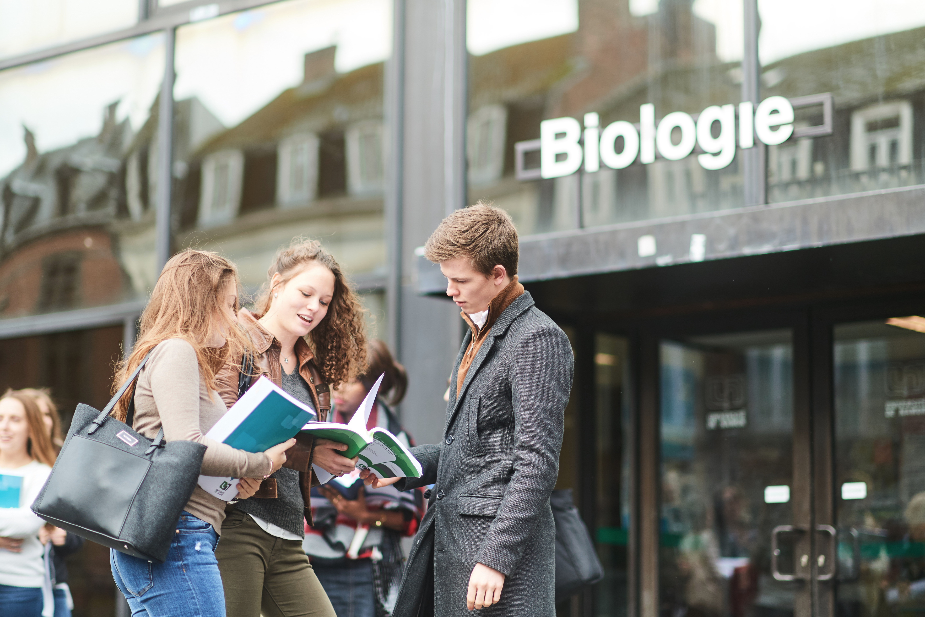 © UNamur - Benjamin Brolet